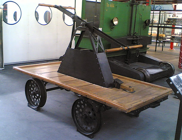 Dresina presente al Verkehrshaus di Lucerna